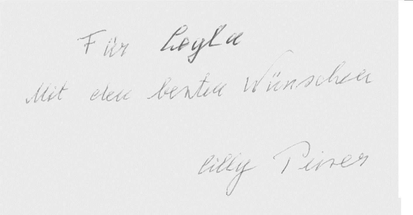 Cilly Levitus-Peiser Autogramm